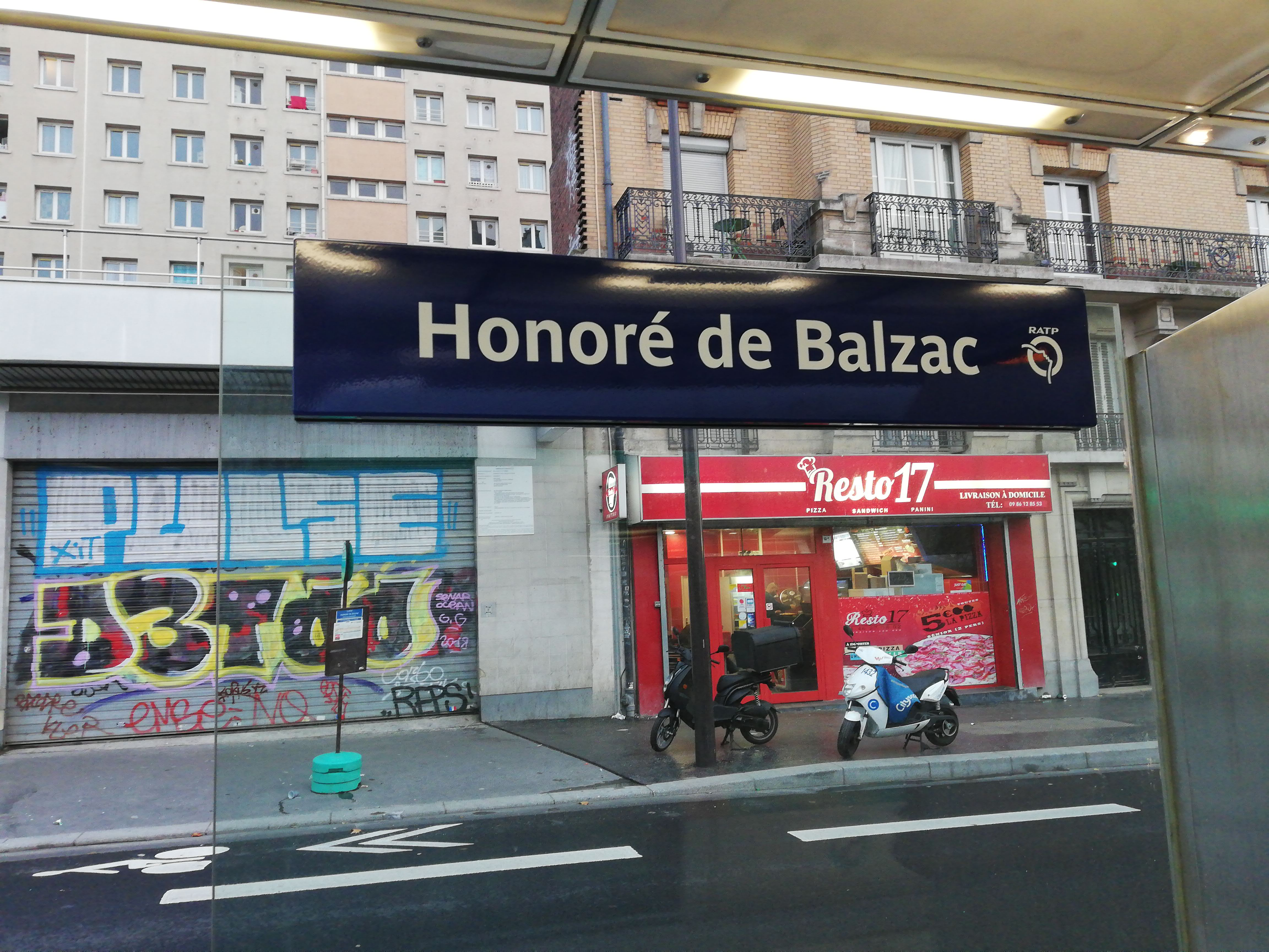 Plaque signalétique de la station Honoré de Balzac de la ligne 3b du tramway d'Île-de-France, le jour de l'ouverture du prolongement de la ligne de Porte de la Chapelle à Porte d'Asnières, en 2018.